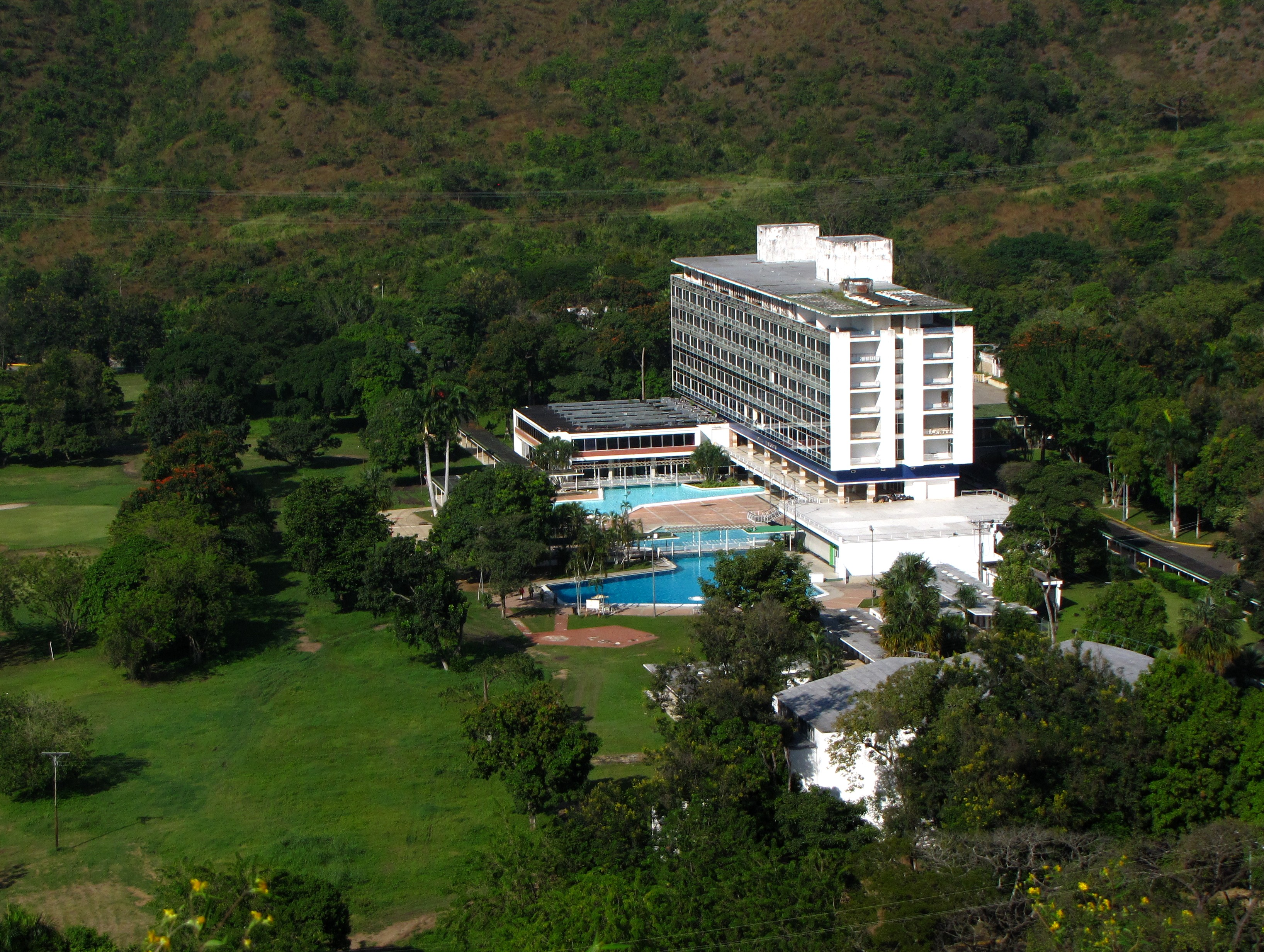 Lugar / place / lieu : Hotel Maracay. Maracay, Estado Aragua, Venezuela.